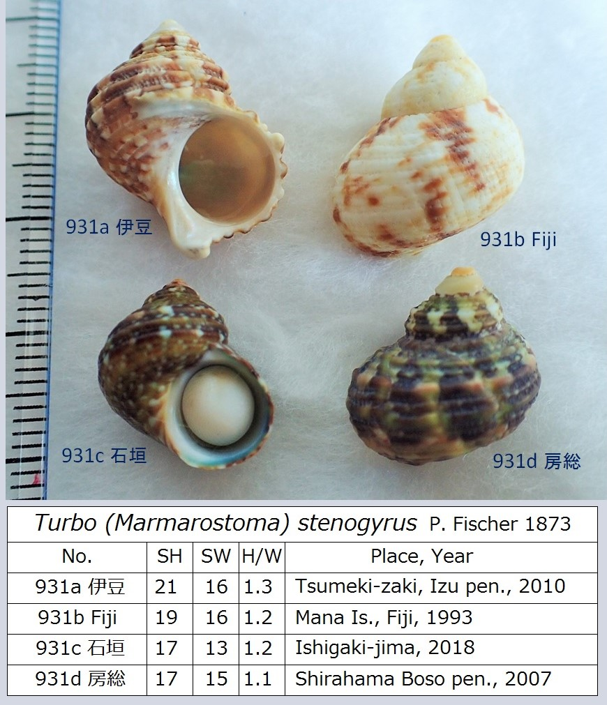 房総、伊豆、石垣島、Fijiの貝殻。